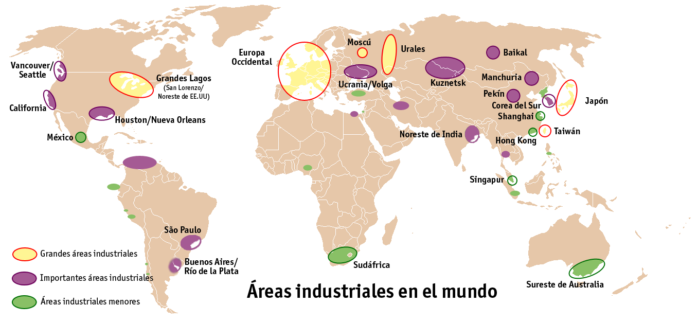 Mapa de situación de las áreas industriales en el mundo. Basado, nuevamente, en la imagen